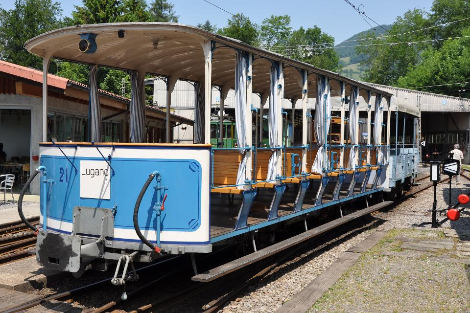 Sommerwagen C2 21 der Lugano–Cadro–Dino-Bahn (LCD) bei der Museumsbahn Blonay–Chamby (BC) in Chaulin im Frühling 2010.